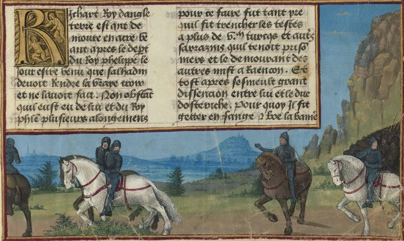 Miniature: Hugues III de Bourgogne ordonnant la retraite